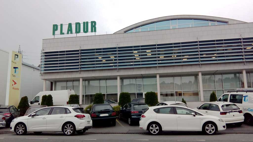 Sede de Tabigal en Pocomaco, A Coruña.